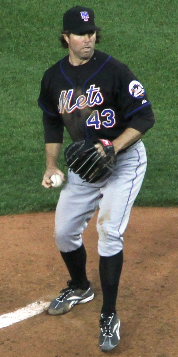 R. A. Dickey